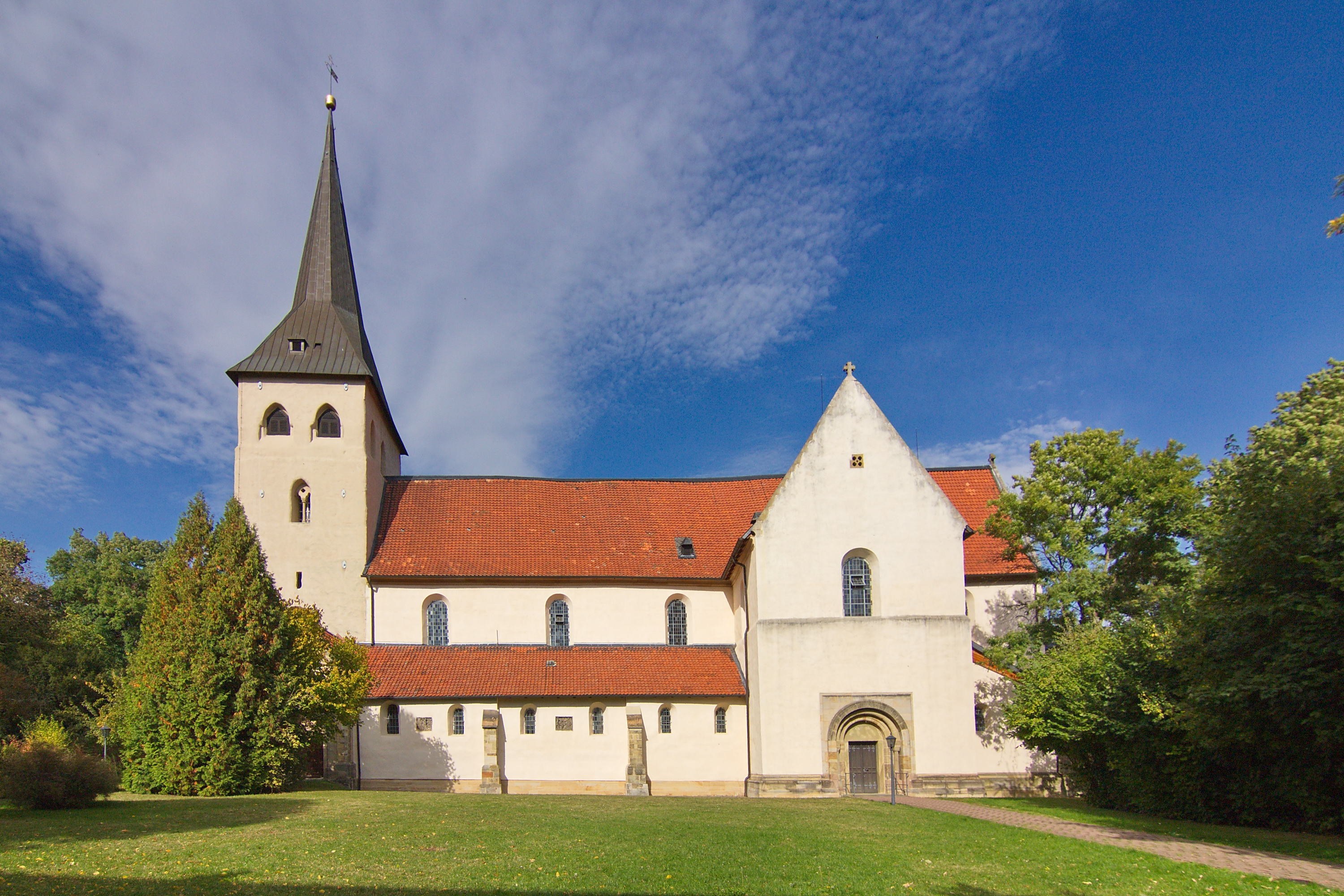 Die katholische Kirche St. Peter und Paul aus dem 12. Jahrhundert ist die größte Kirche in Heiningen, sie gehört seit 2006 zur Pfarrgemeinde St. Petrus in Wolfenbüttel.